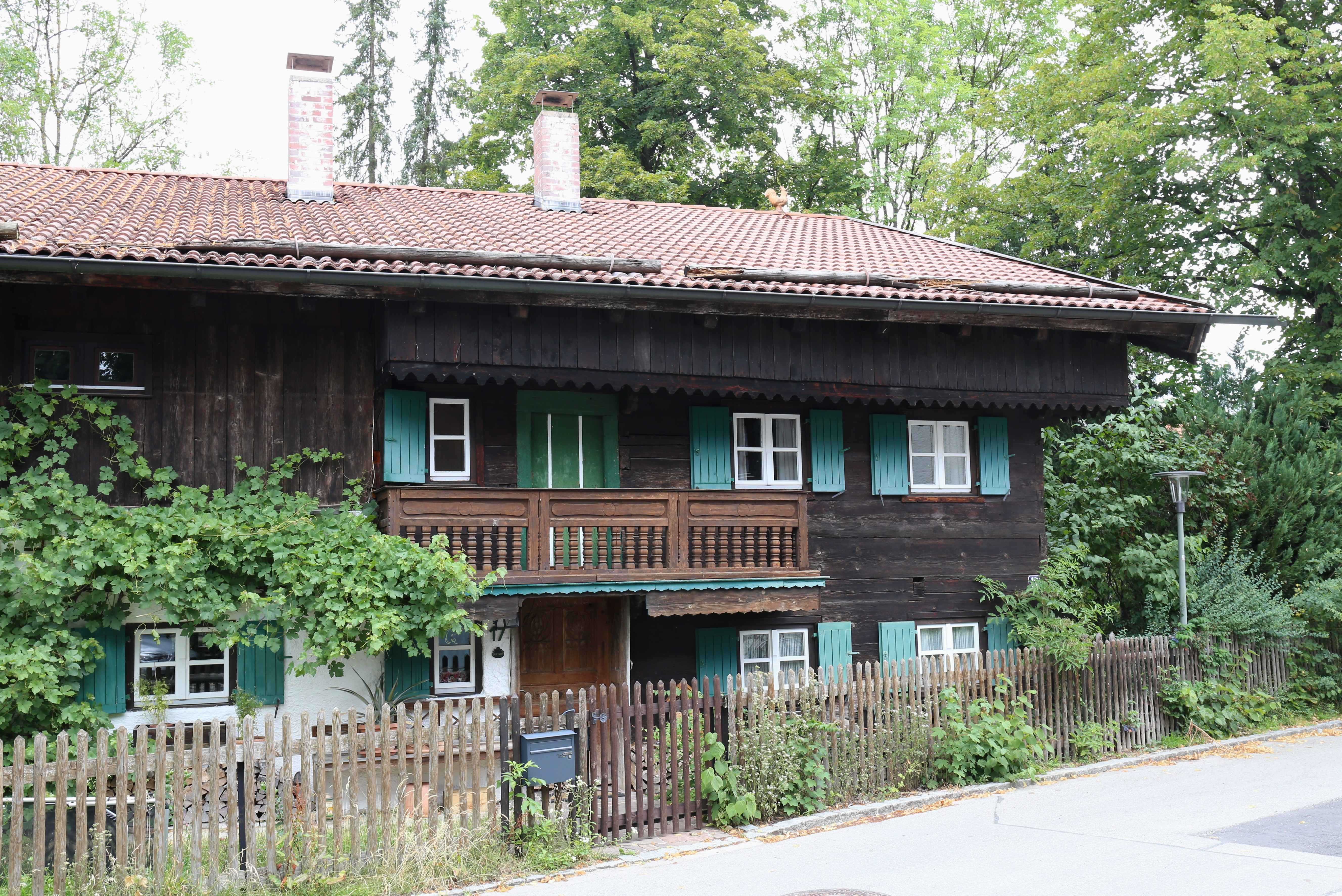 Bürgermeister-Prenn-Straße 17, Unterhaching; ehemalige Schmiede und Einfirsthof, sogenannt Beim Bauernschmied, zweigeschossiges Mittertennhaus mit verbrettertem Giebel, Wohnteil in Blockbauweise, 18. Jahrhundert